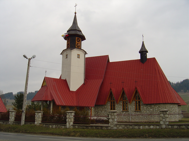 Kościół w Czarnej Górze w granicach polskiej części Spisza. Kostol v Čiernej Hore. Odfotil 09.04.2005 Kristián Slimák. Kategória:Obrázky budov Kategória:Presunúť na Commons